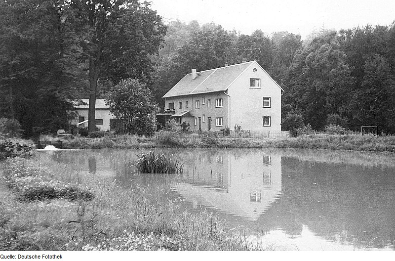 Original image description from the Deutsche Fotothek Göda-Nedaschütz. Ehem. Ölmühle